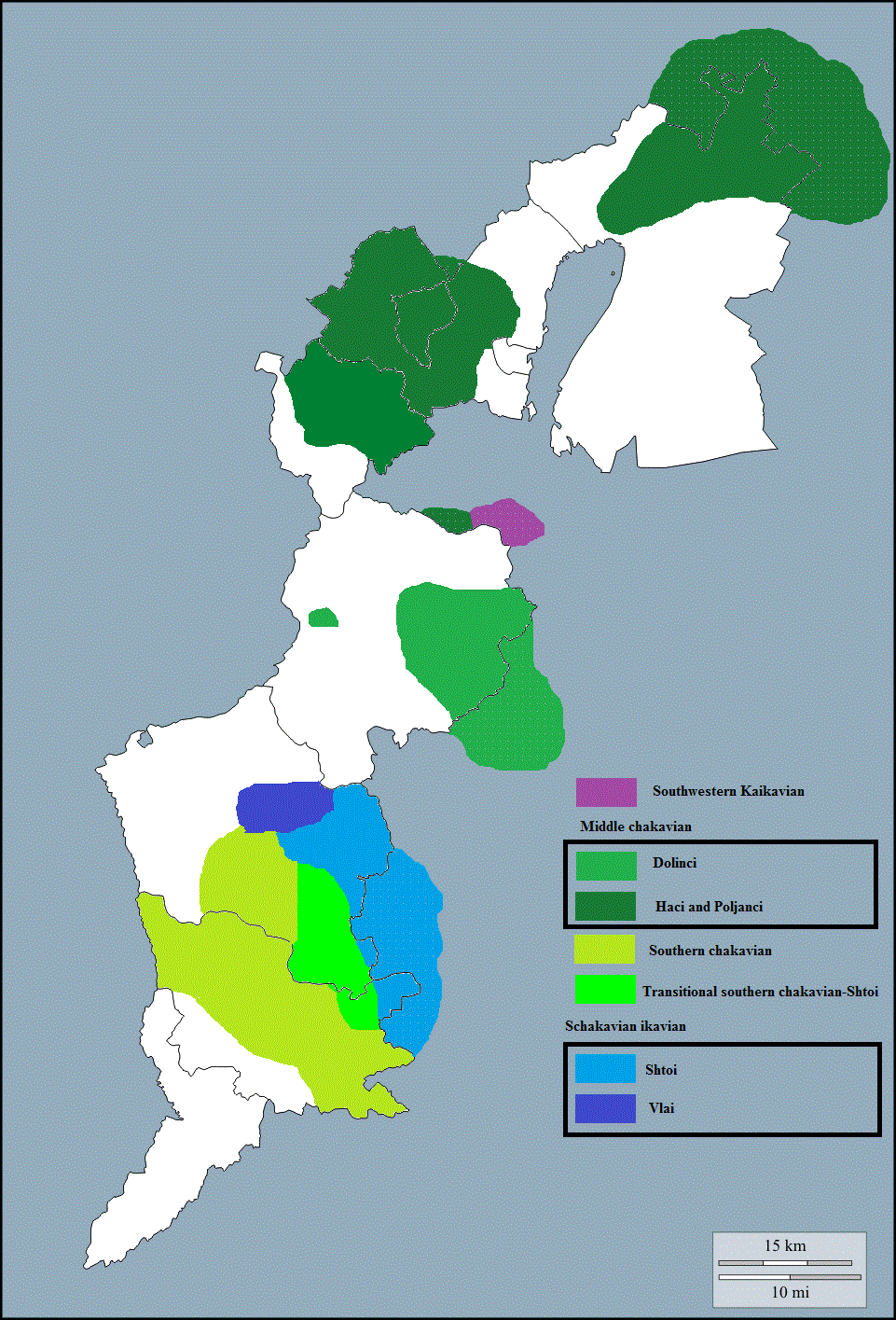 Hrvatski govori u Gradišću po